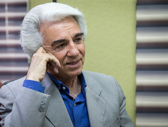 بهرام گودرزی ۱۵ فروردین ۱۳۹۷